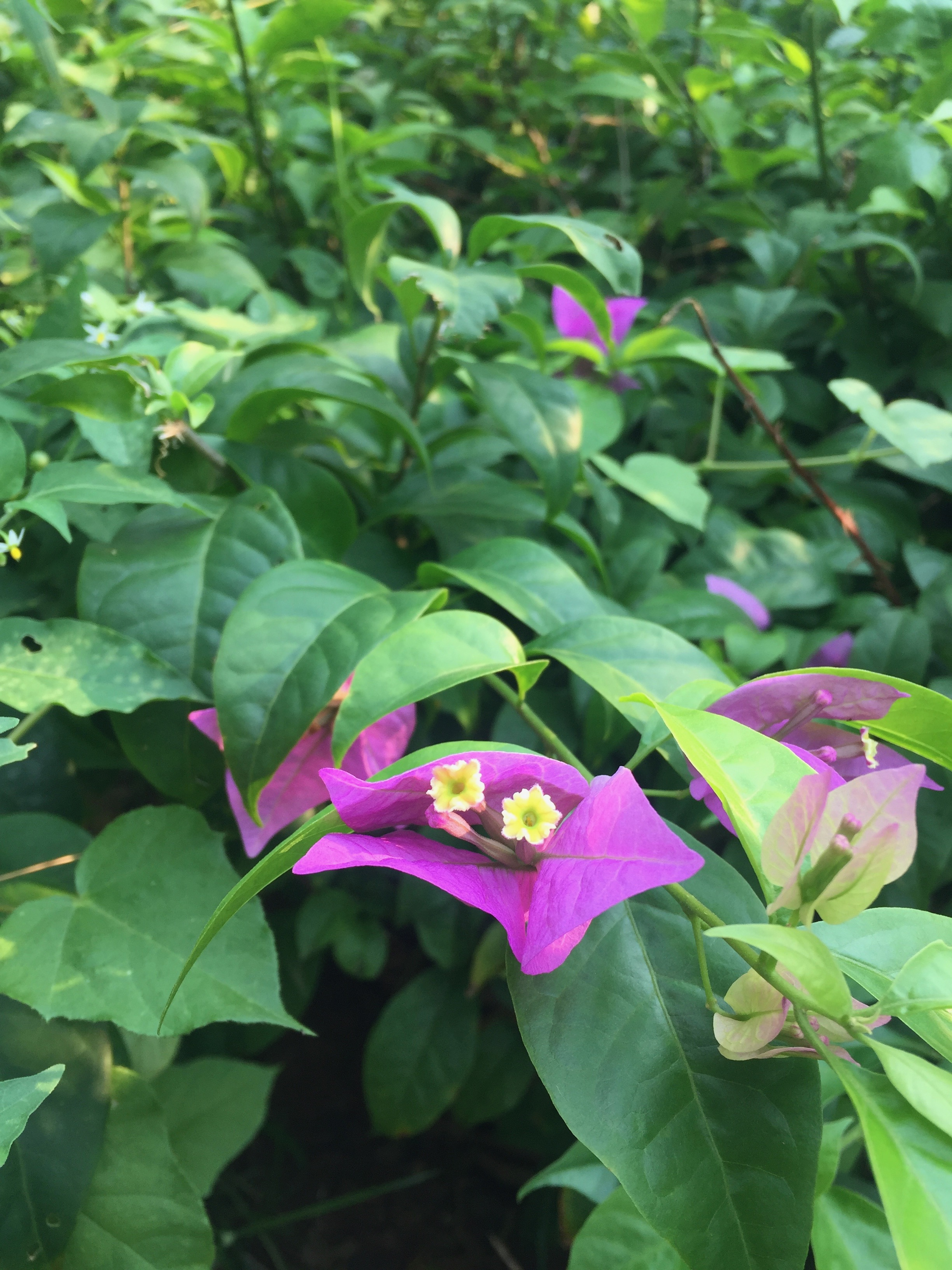 Sebuah bunga bougenville ungu